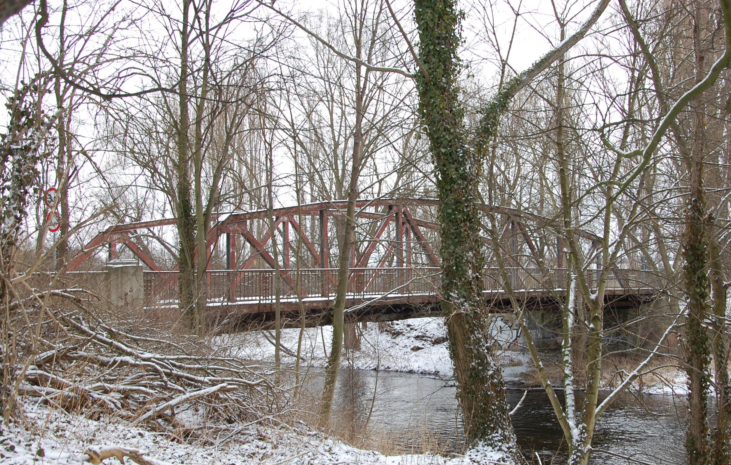 Schafbrücke Quedlinburg